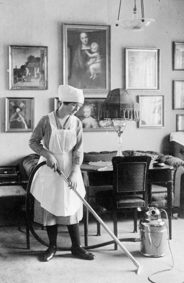 Den første støvsuger model til husholdningsbrug fra Fisker & Nielsen C5 modellen. Senere skiftede firmaet navn til det nu mere kendte navn Nilfisk.